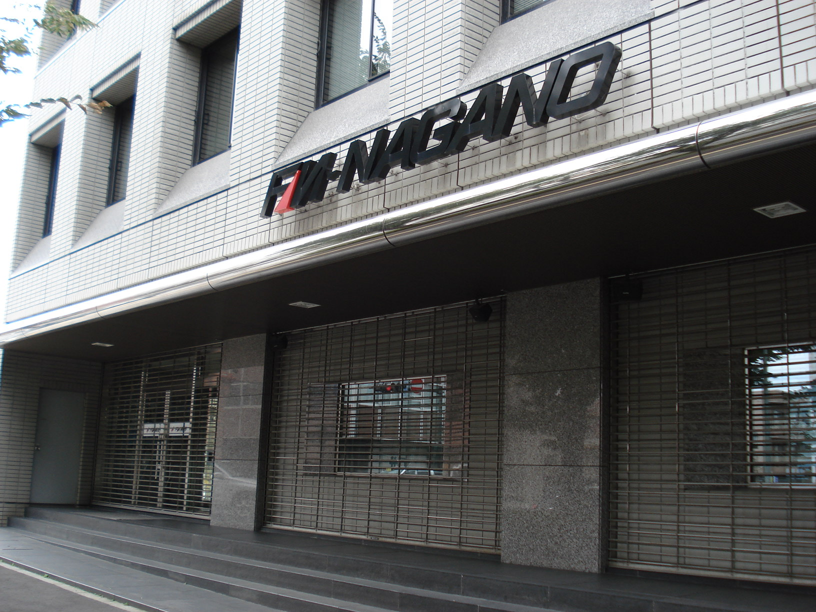 長野エフエム放送本社社屋 長野県松本市本庄1-13-5